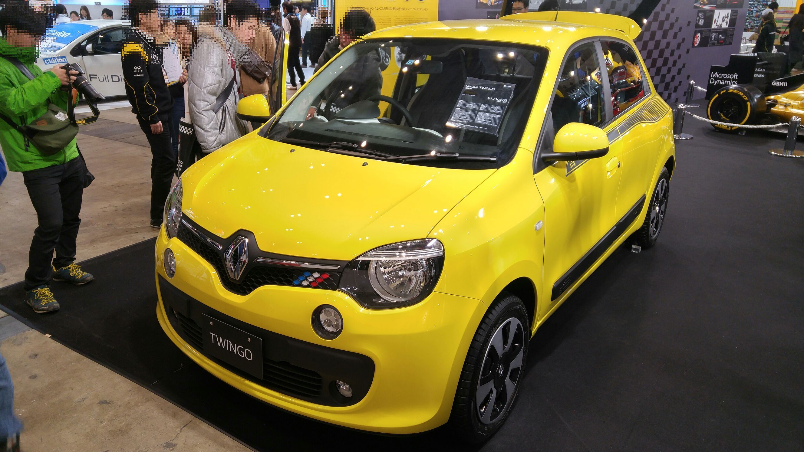 ルノー・トゥインゴ